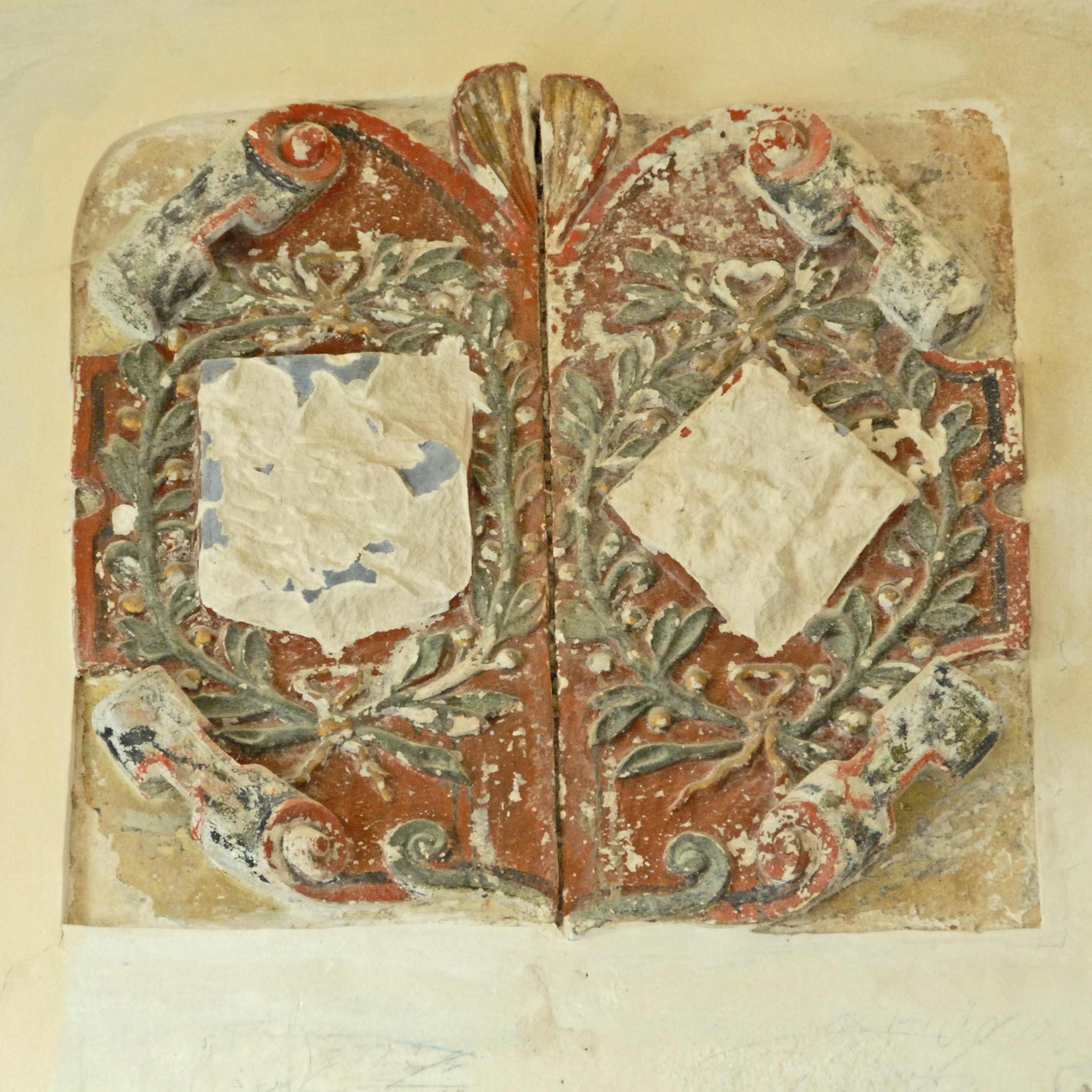 St-Vorles de Châtillon-s-S, Rest eines Flügelaltars